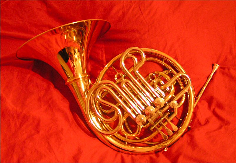 Modern Double - French Horn (F/Bb) Photographer: Martin Steiger Lizenz: GNU FDL, Publikation mit Genehmigung des Fotografen (an John Doe) originally uploaded as Waldhorn - 001.jpg to de.wikipedia 22:23, 14. Mär 2004 . . John Doe (105100 Byte)